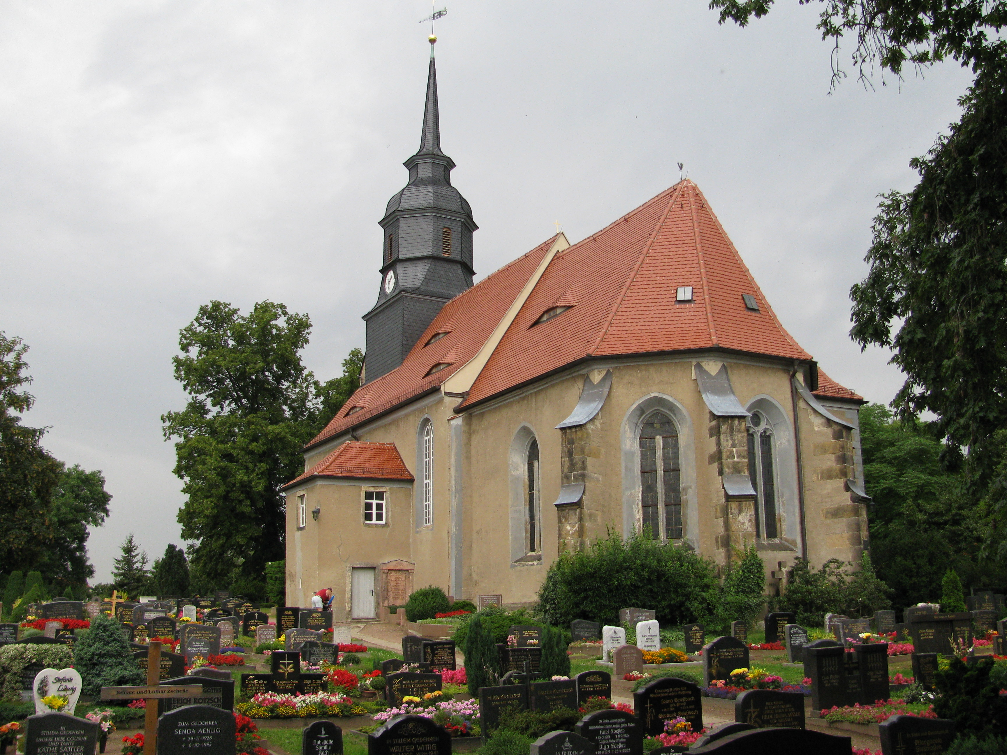 Kirche in Reichenberg, Gemeinde Moritzburg, Sachsen